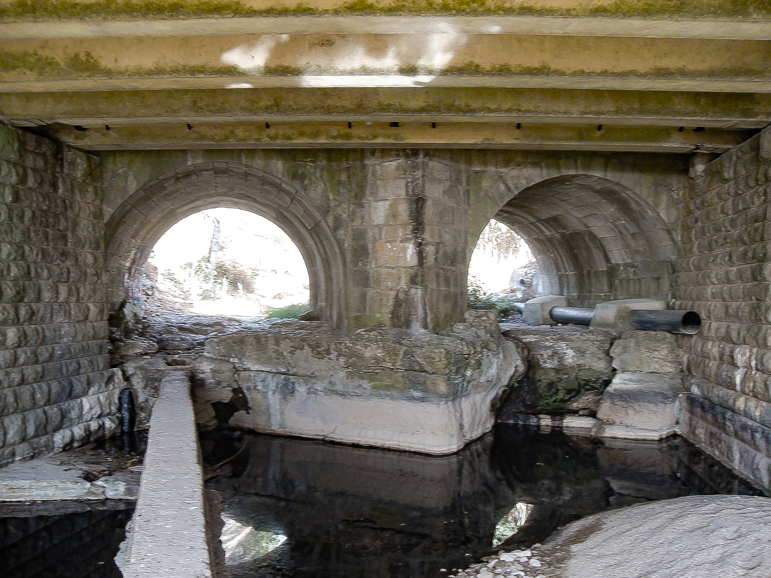 Pormenor das arcadas e talha-mares da Ponte Filipina de São Pedro do Estoril.